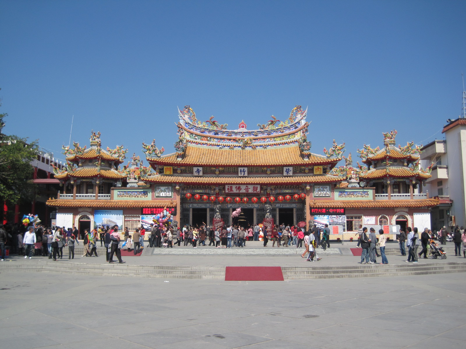 位在臺灣高雄的內門紫竹寺